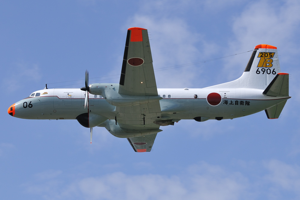 ys11t-a